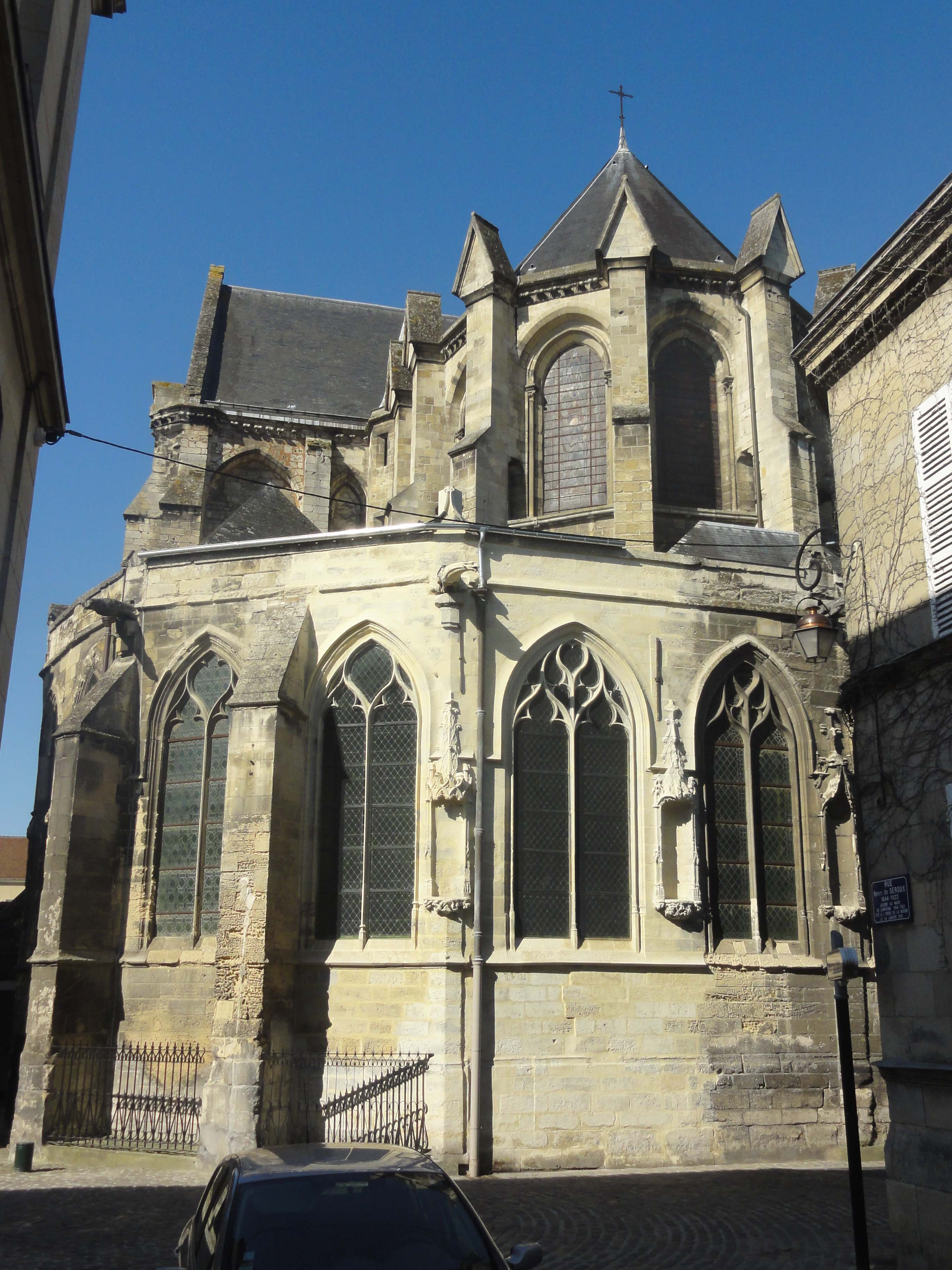 Église Saint-Jacques de Compiègne - voir le titre du fichier.